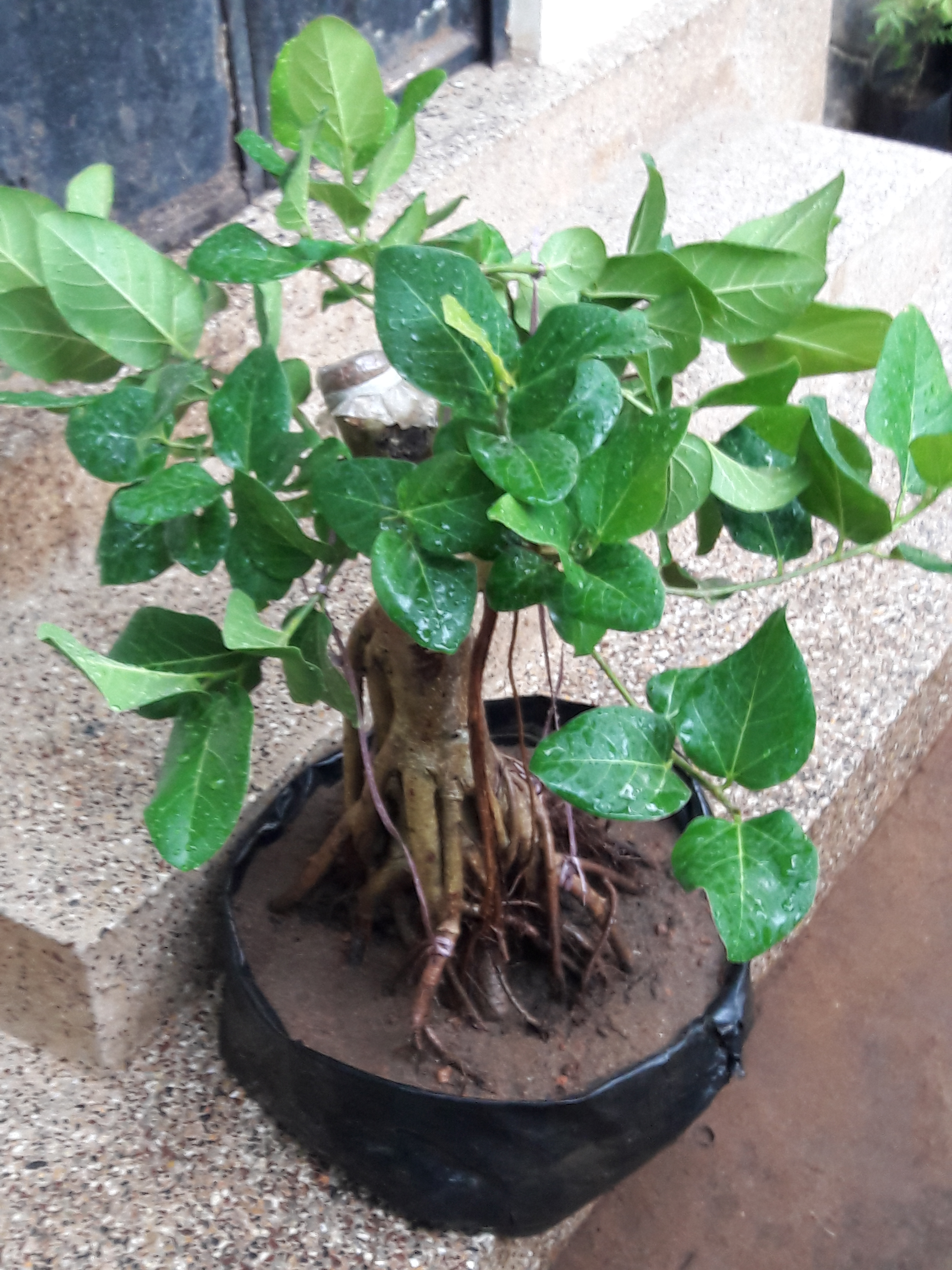 ബോൺസായ്